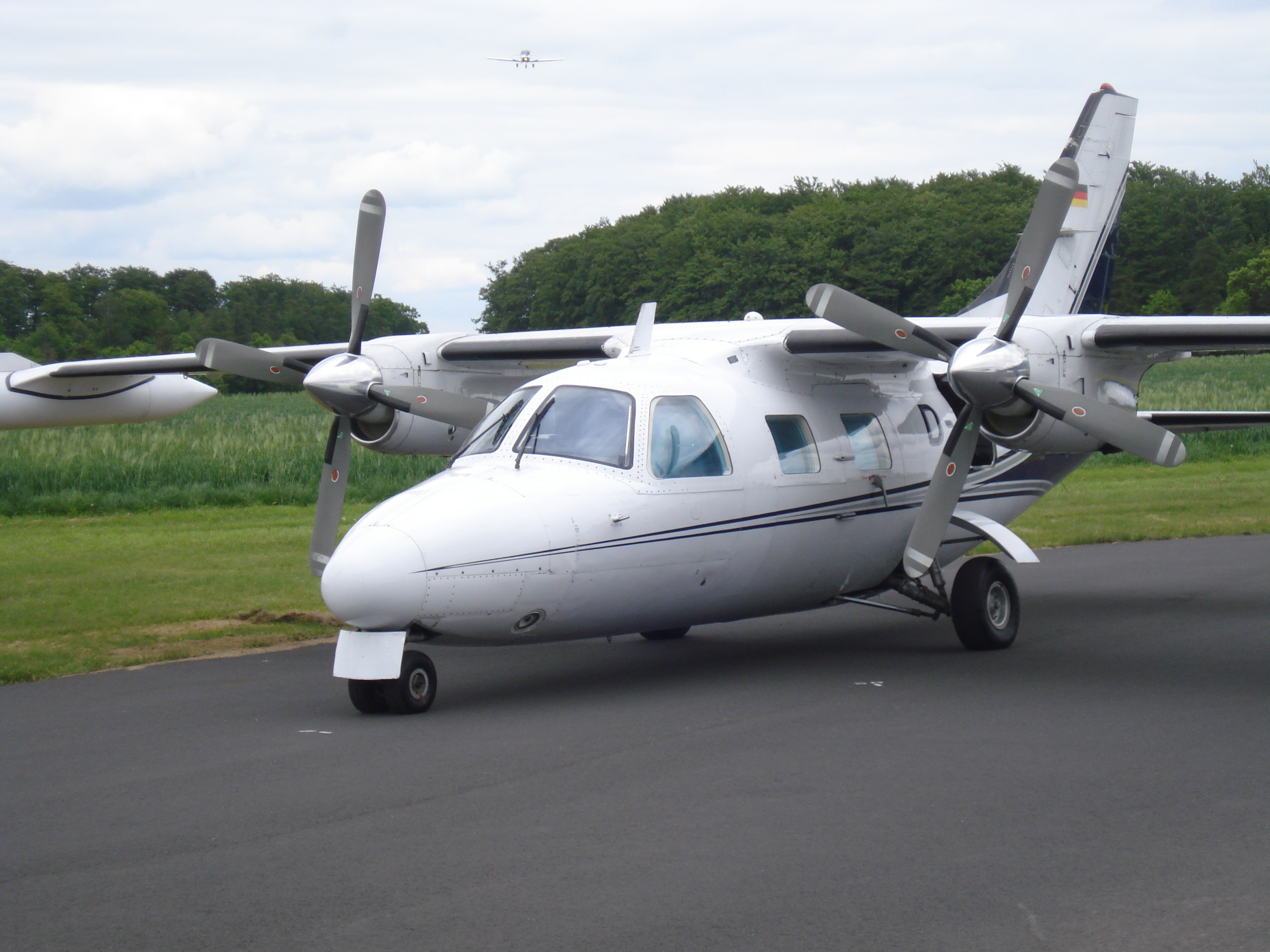 Mitsubishi MU-2 auf dem Flugplatz Günterode/Heiligenstadt